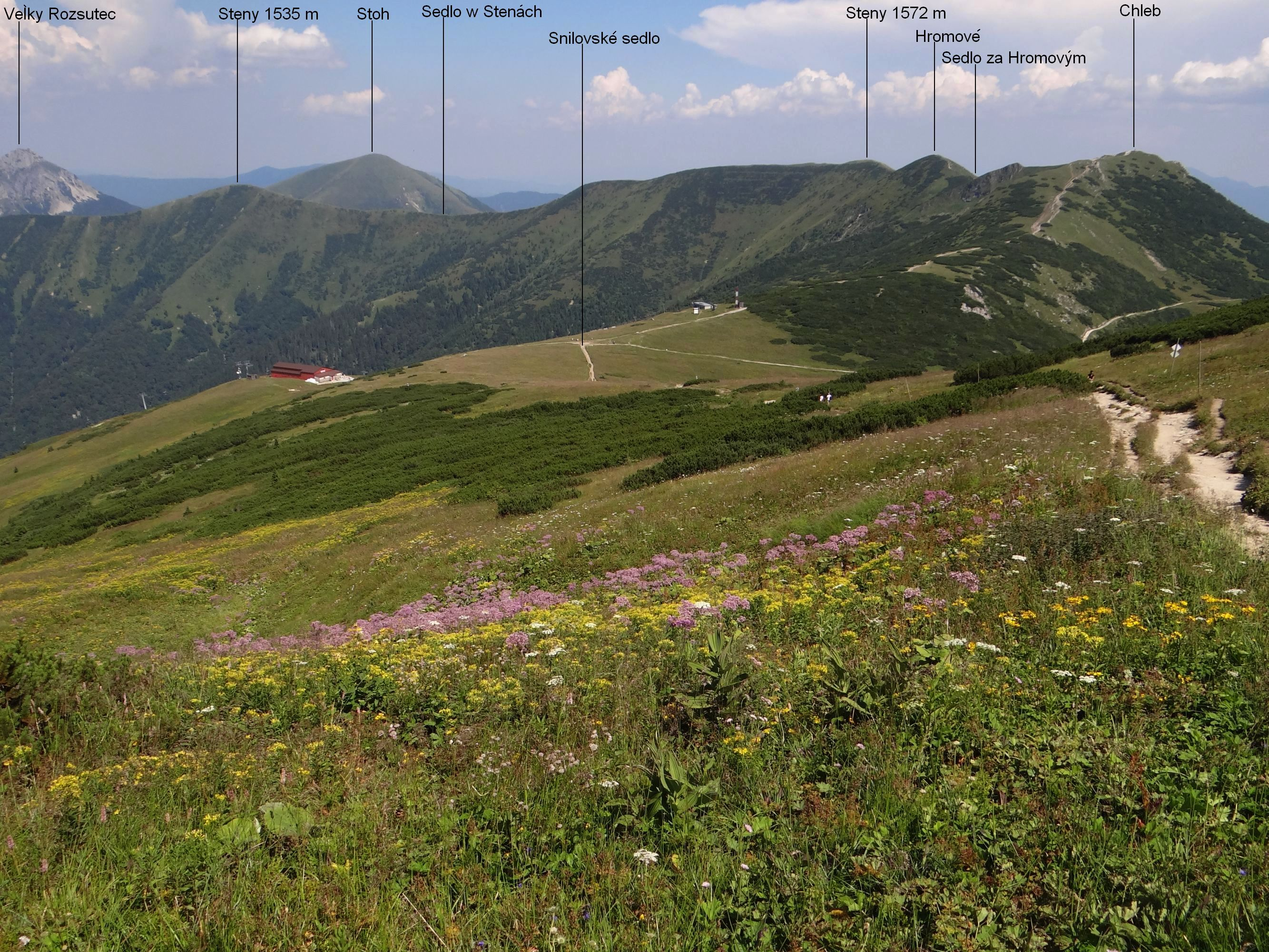 Steny